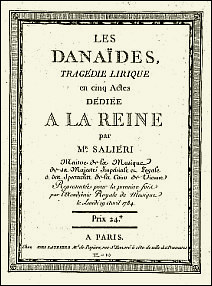 Antonio Salieri: "Les Danaides" - Deckblatt des Erstdrucks der Partitur